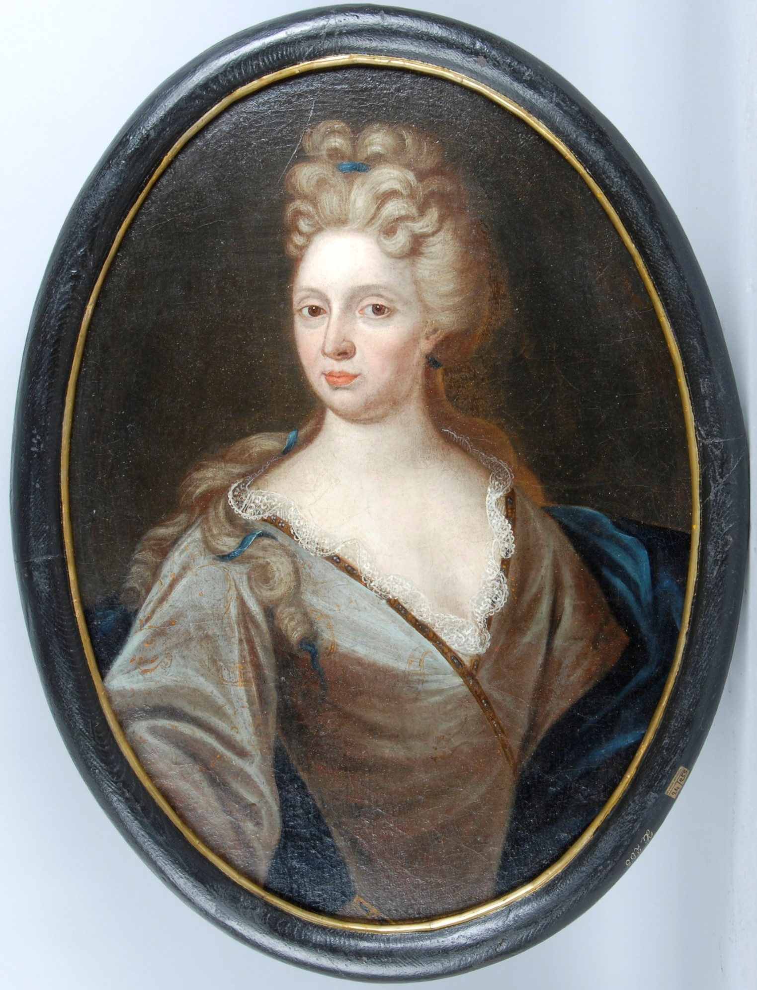 Marie Barbora Krakowská z Kolowrat, rozená z Wrbna a Freudenthalu (manželka Maximiliana Norberta Krakowského z Kolowrat)